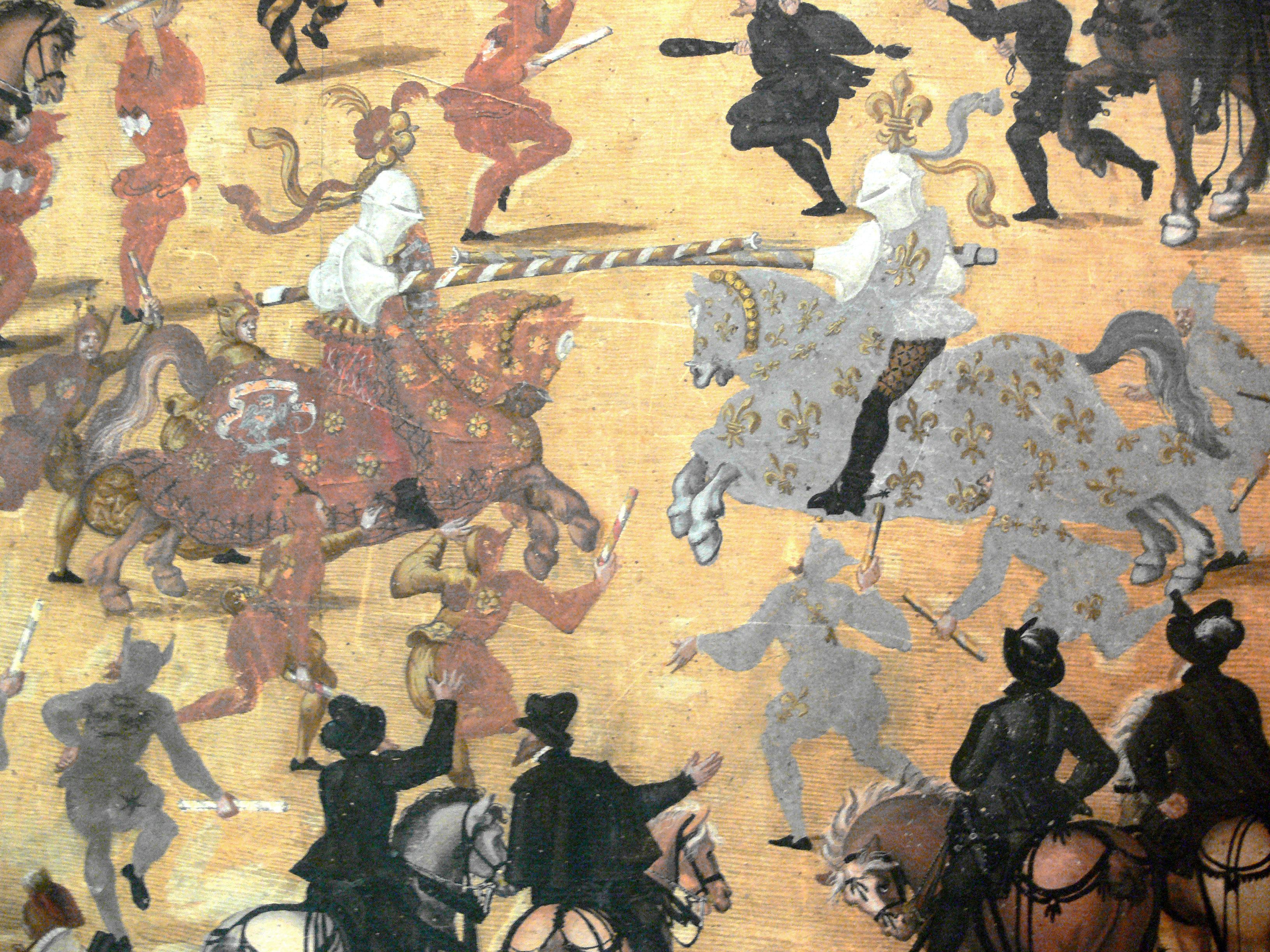 Jost Amman: Gesellen-Stechen der bürgerlichen Patrizier-Söhne Nürnbergs, vom 3. März 1561. Nürnberg, 1561. Bayerisches Nationalmuseum München, Inv. 49/43